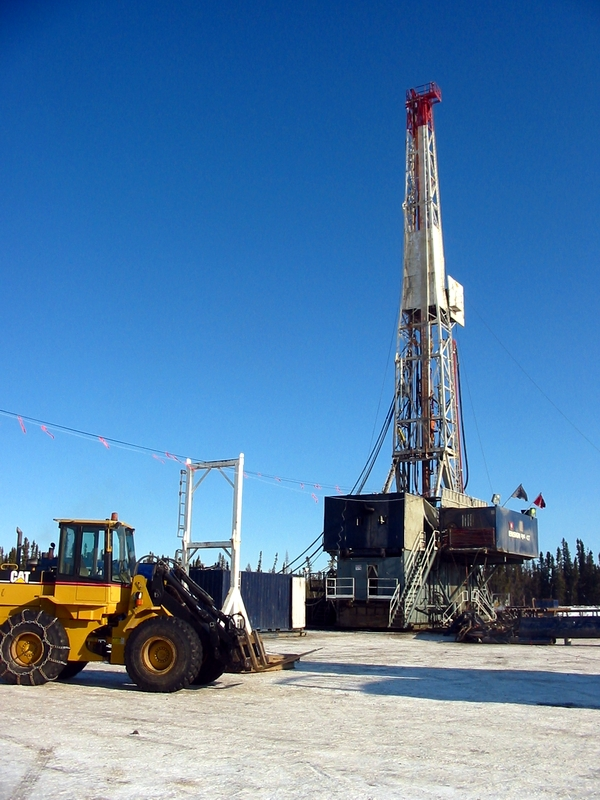 Oil drilling rig, northern Alberta, Canada